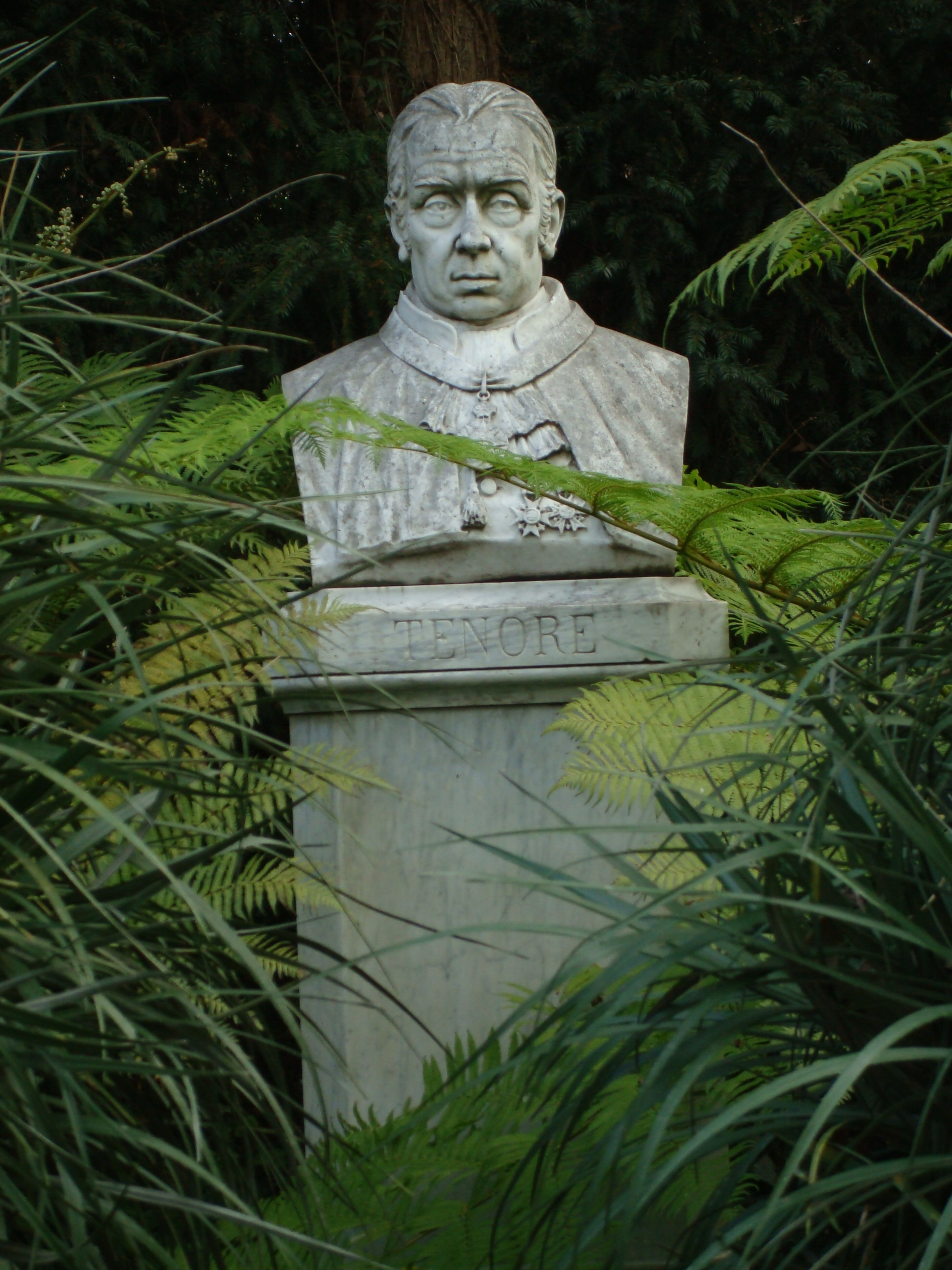 buste de Michele Tenore (1780-1861) au Jardin botanique de Naples (Orto Botanico, Napoli)